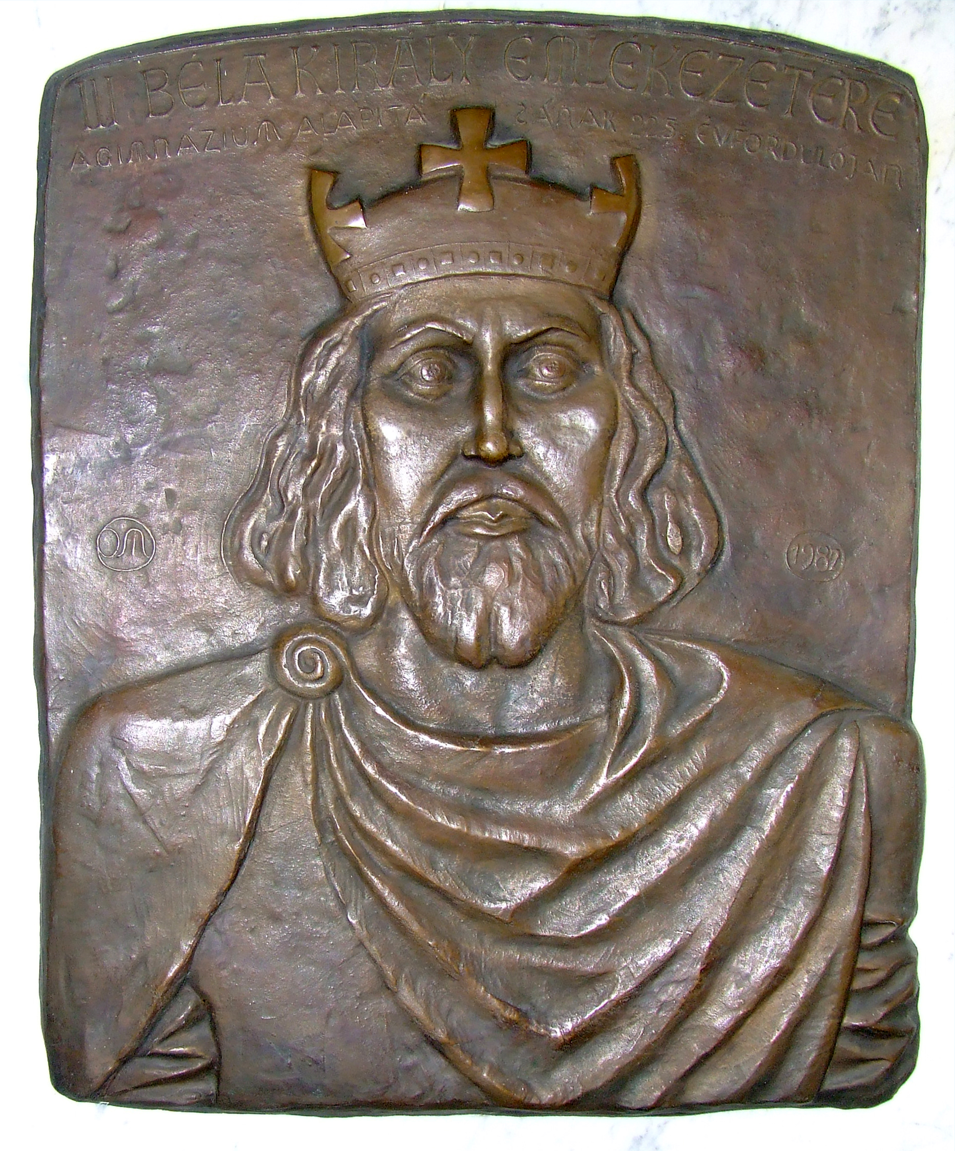 III. Bélát ábrázoló dombormű a Bajai III. Béla Gimnáziumban. Állították a gimnázium alapításának 225. évfordulóján, 1982-ben. Osváth Mária alkotása